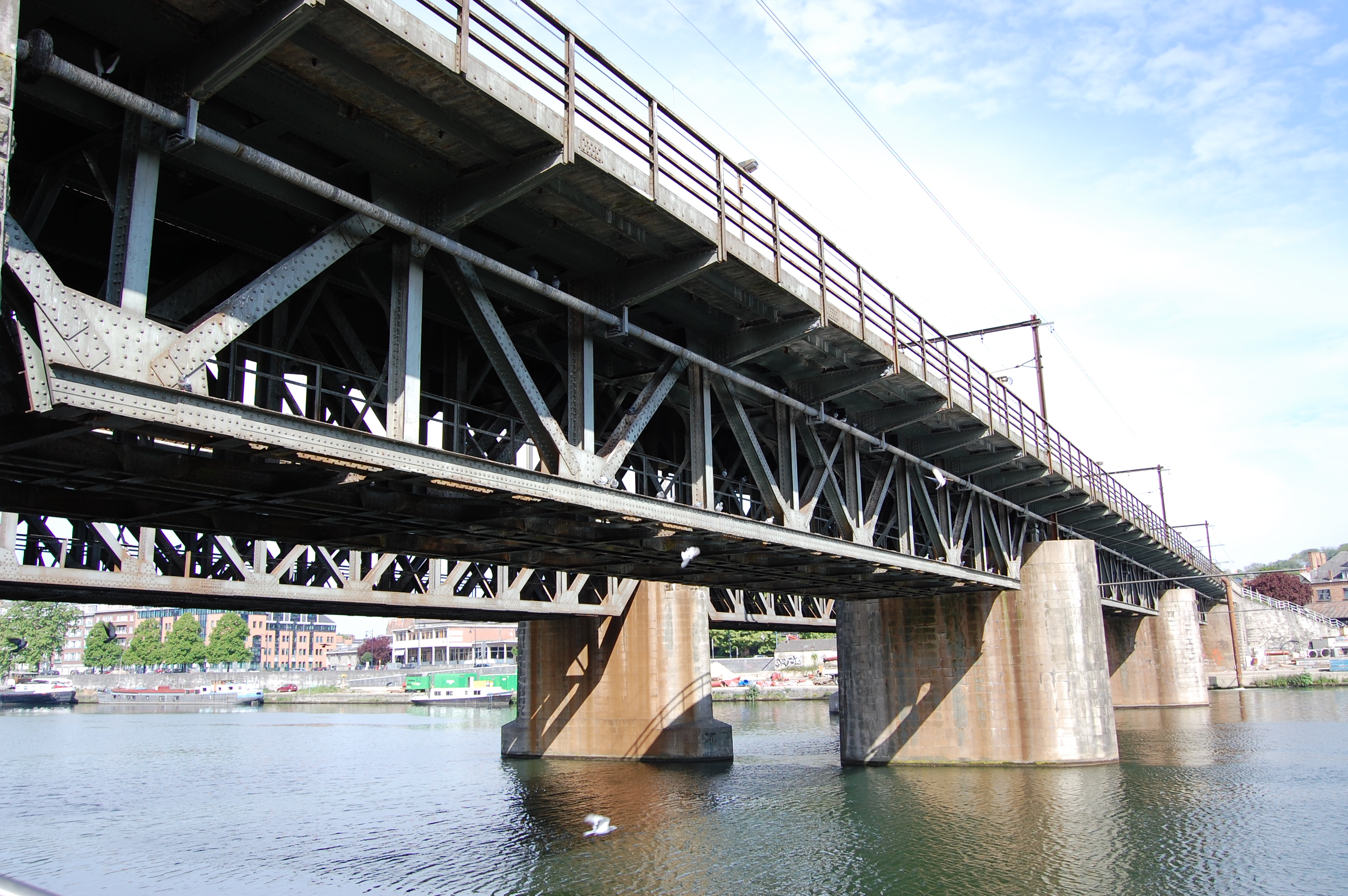 Photo du tablier de la ligne 162 voie A. Photo prise de la culée côté Jambes.